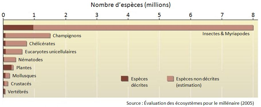 Espèces identifiées et non identifiées d'après l'Évaluation des écosystèmes pour le millénaire (2005)